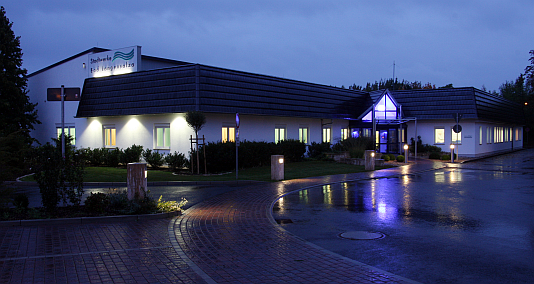 Firmensitz